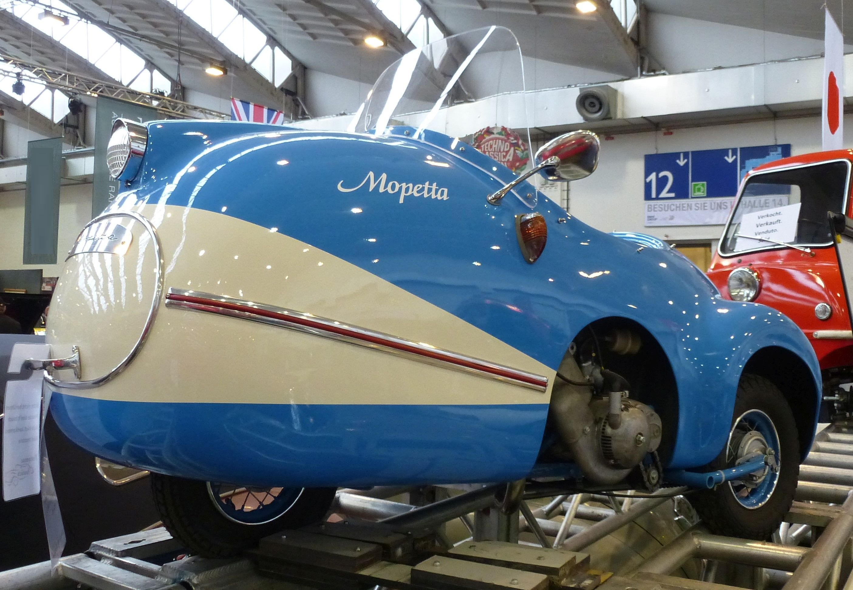 Mopetta GmbH Mopetta Nachbau von Andy Carter